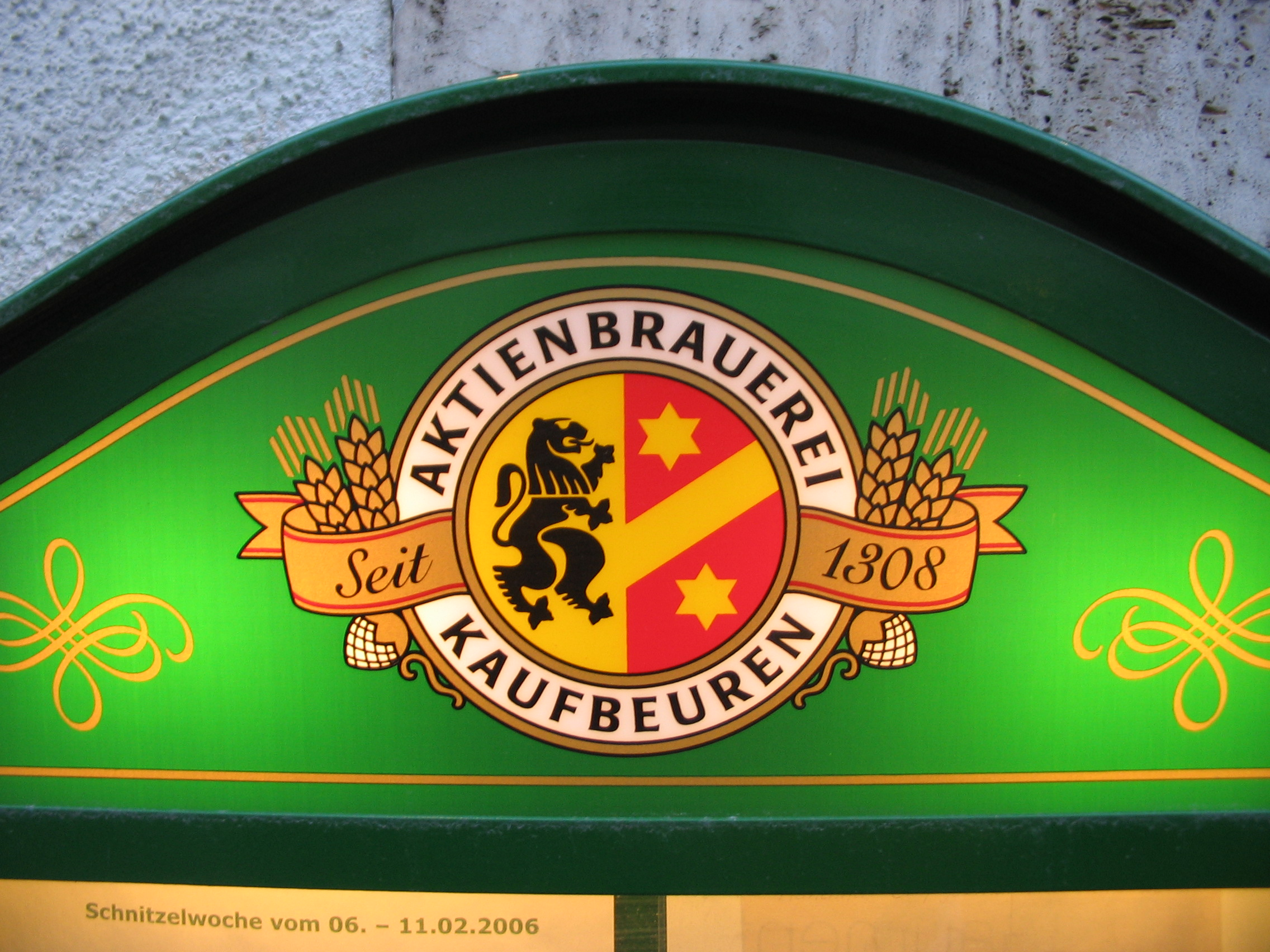 Logo of Aktienbrauerei Kaufbeuren in Munich